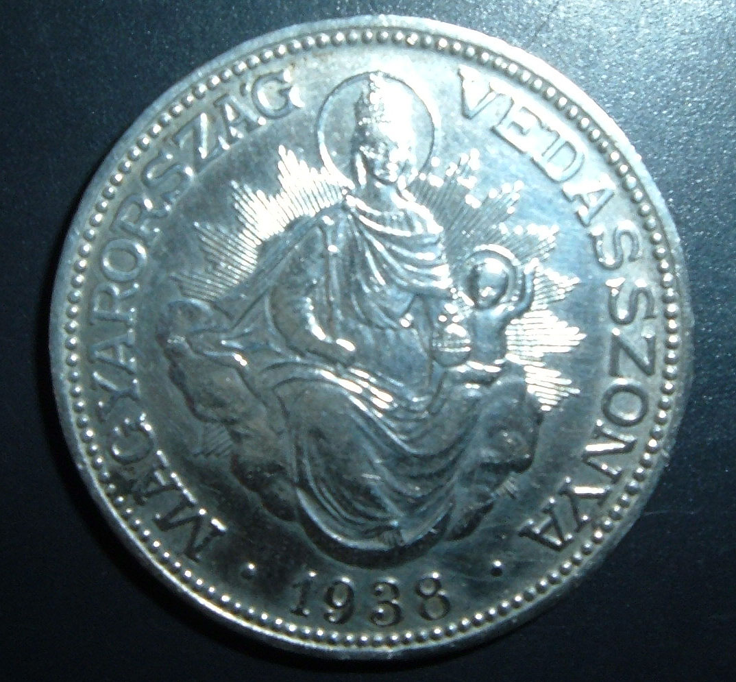 HUP 2 1936